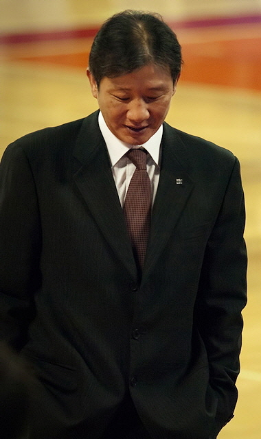 2010-프로농구-KCC-vs-SK